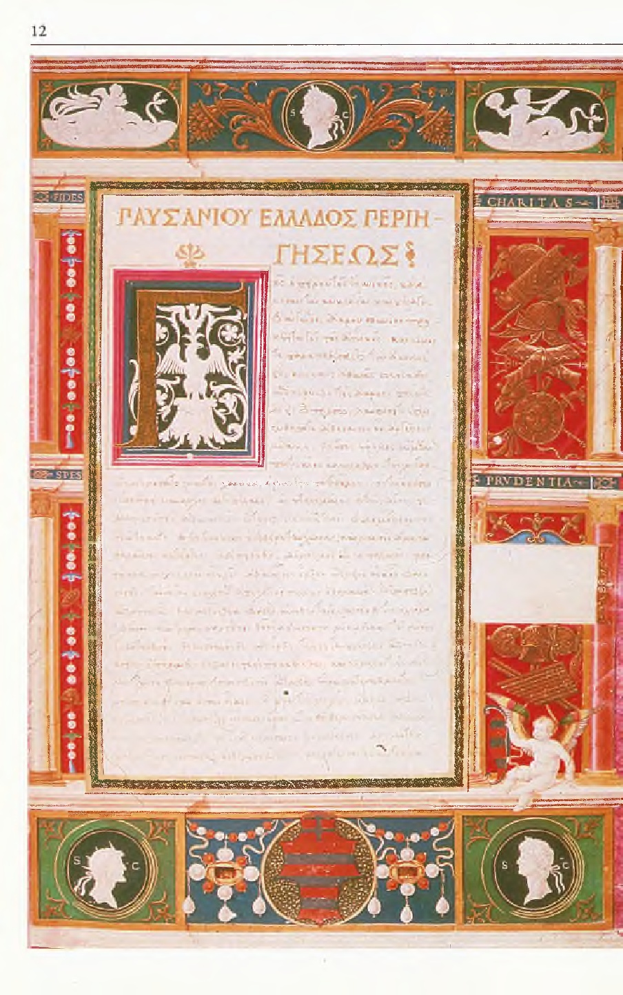 Εξώφυλλο του Παυσανία. Βιβλιοθήκη Λορετζιάνα, Φλωρεντία. — Εικόνα από το βιβλίο Αρχαία Ελλάδα: η αρχαιολογία μιας ανακάλυψης του Ρολάν και η Φρανσουάζ Ετιέν, συλλογή «Ανακαλύψεις Δεληθανάση / Αρχαιολογία» (νο. 12), Αστέρης Δεληθανάσης, 2000. Περιγραφή στη σελίδα 171.